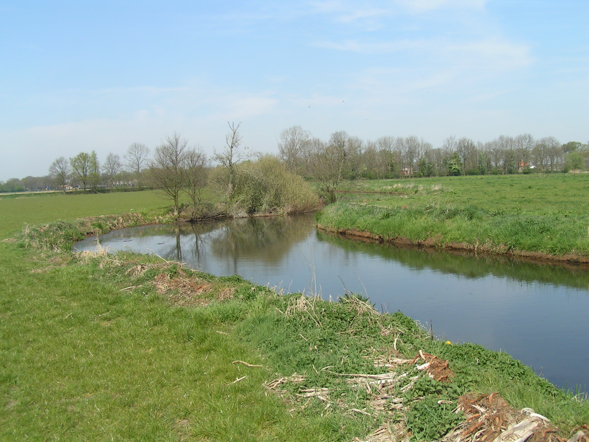 Heeswijk Dinther, rivier de Aa